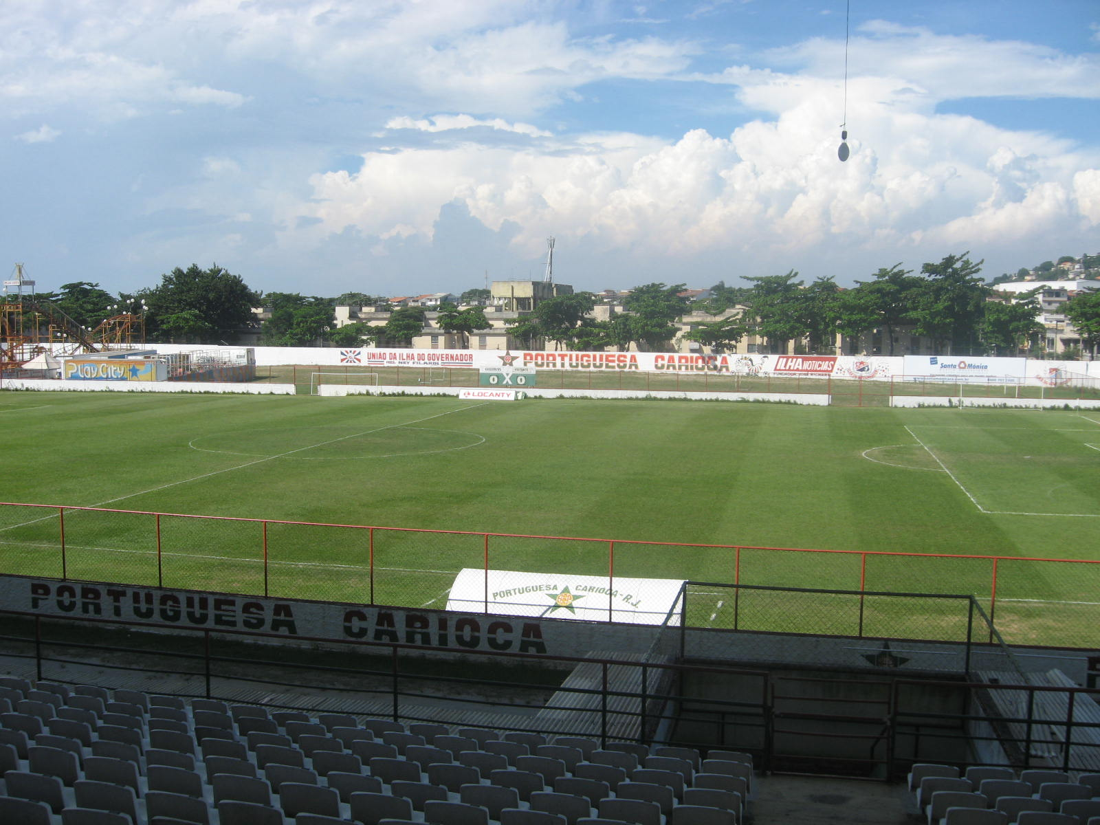 Estádio Luso-Brasileiro, da AA Portuguesa, localizado na Ilha do Governador.